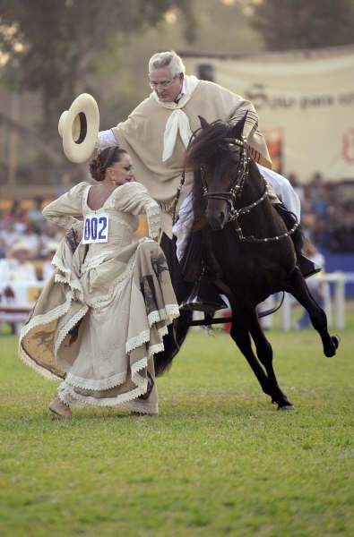 Chalan mostrando la habilidad del Caballo de paso Peruano a paso de marinera.